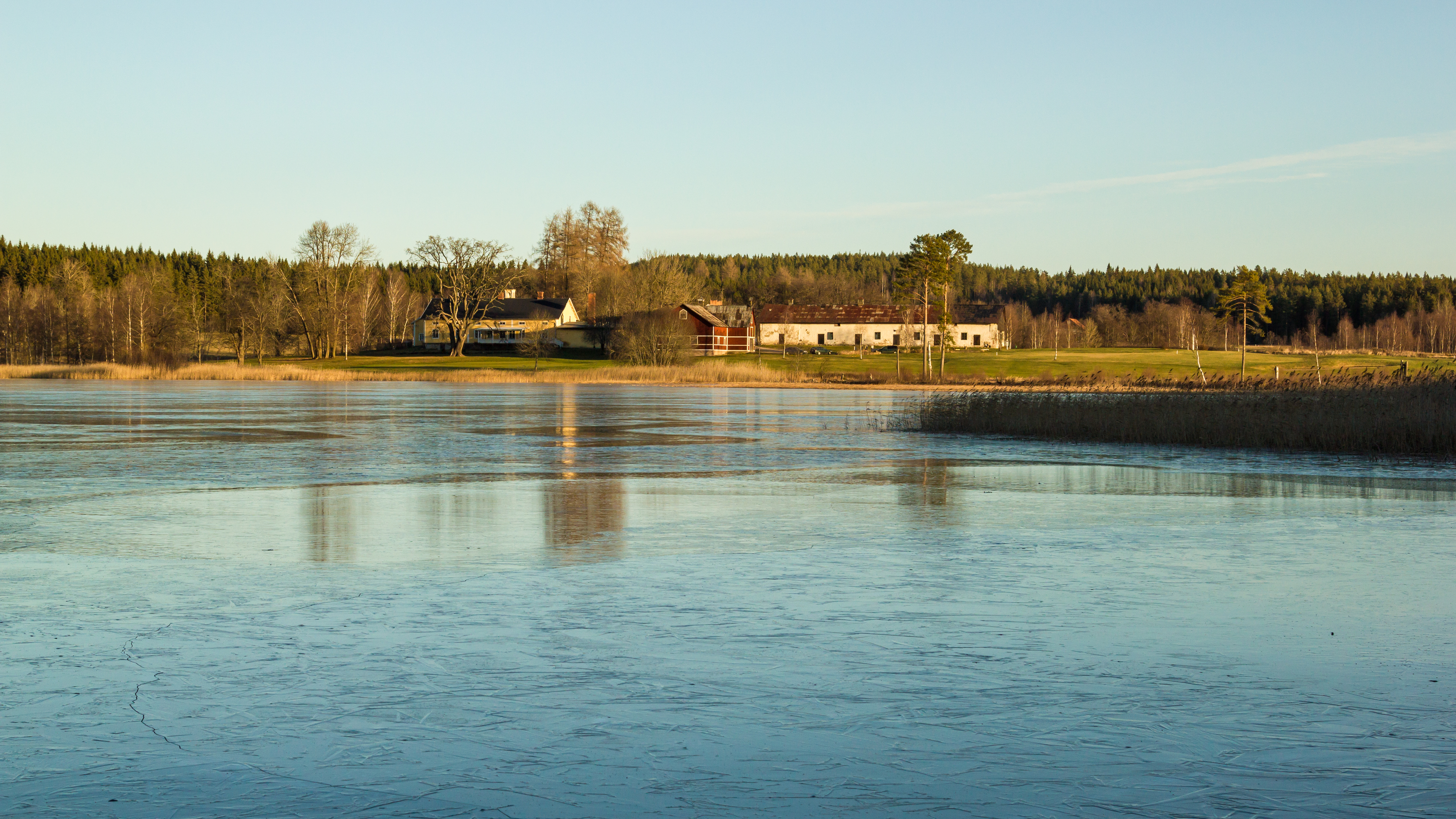 Prästhyttsjön, med herrgården i Prästhyttan i bakgrunden, Hedemora kommun, Sverige.